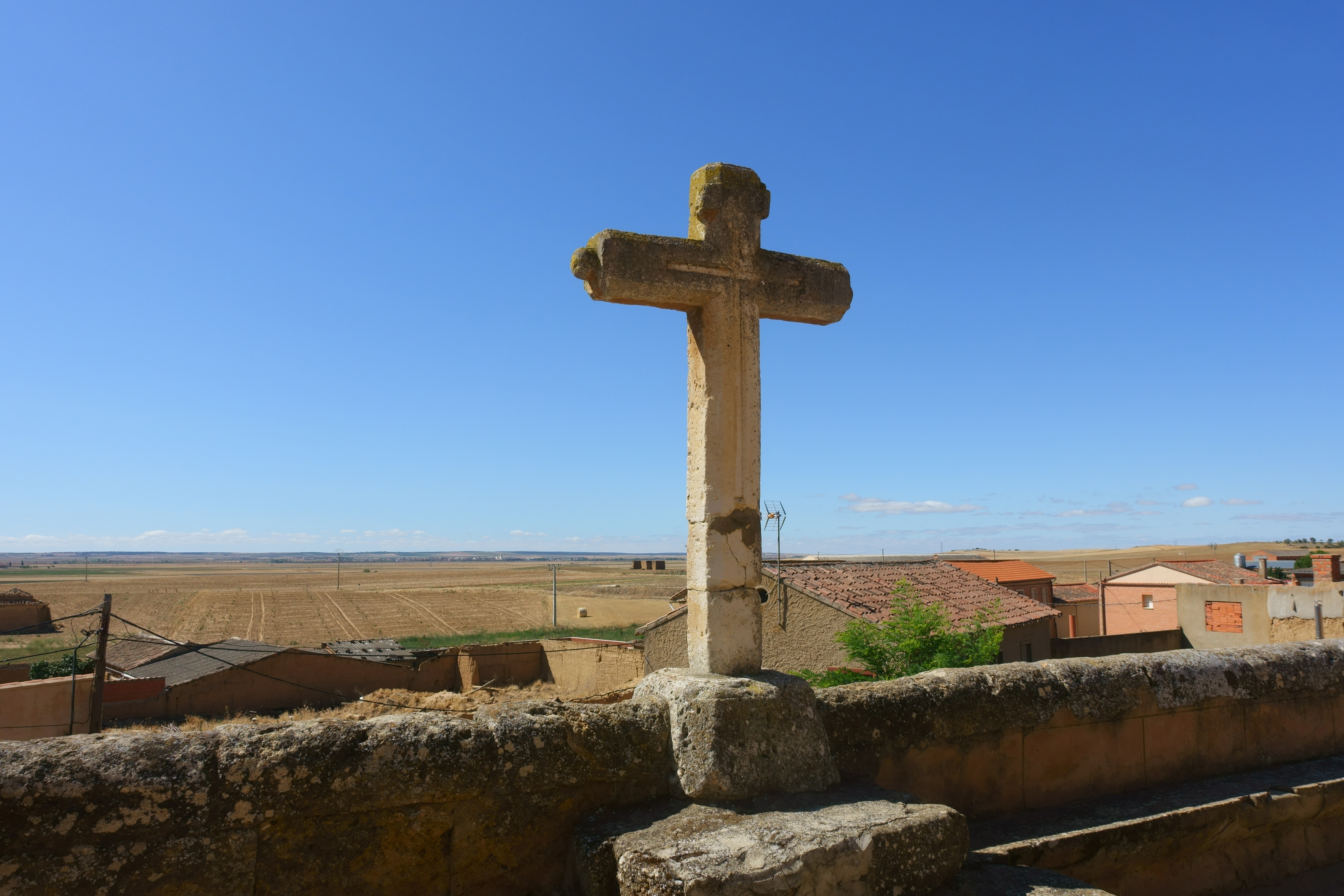 Vista de Tierra de Campos desde la iglesia de Santa Marina, en Prado (Zamora, España).